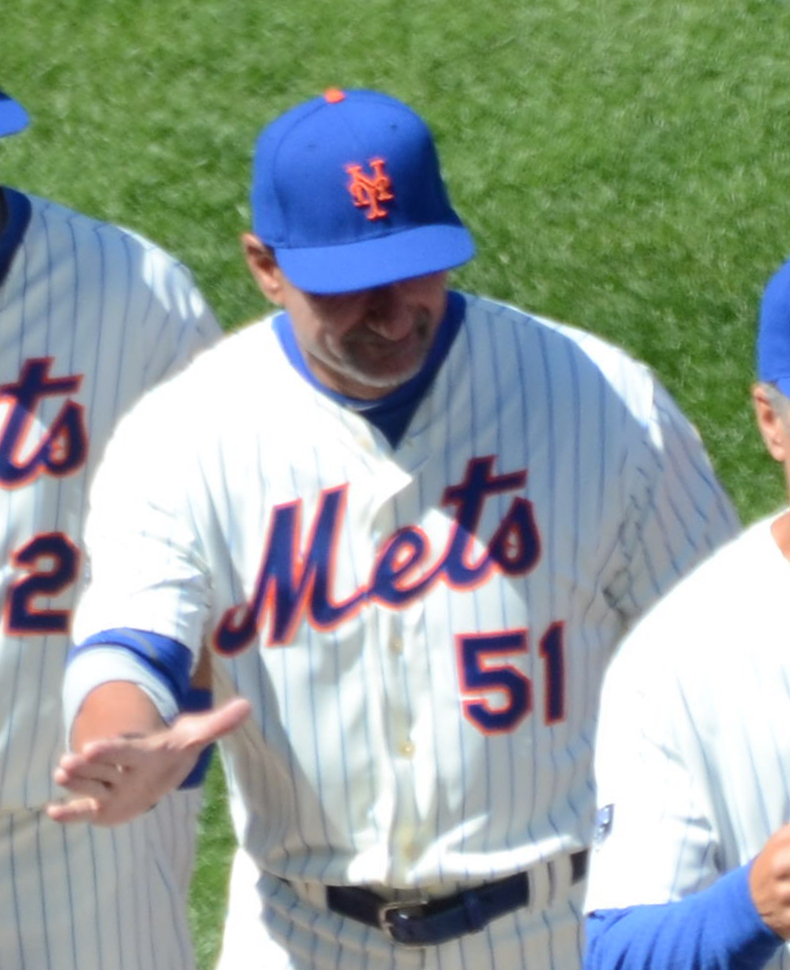 Dave Hudgens